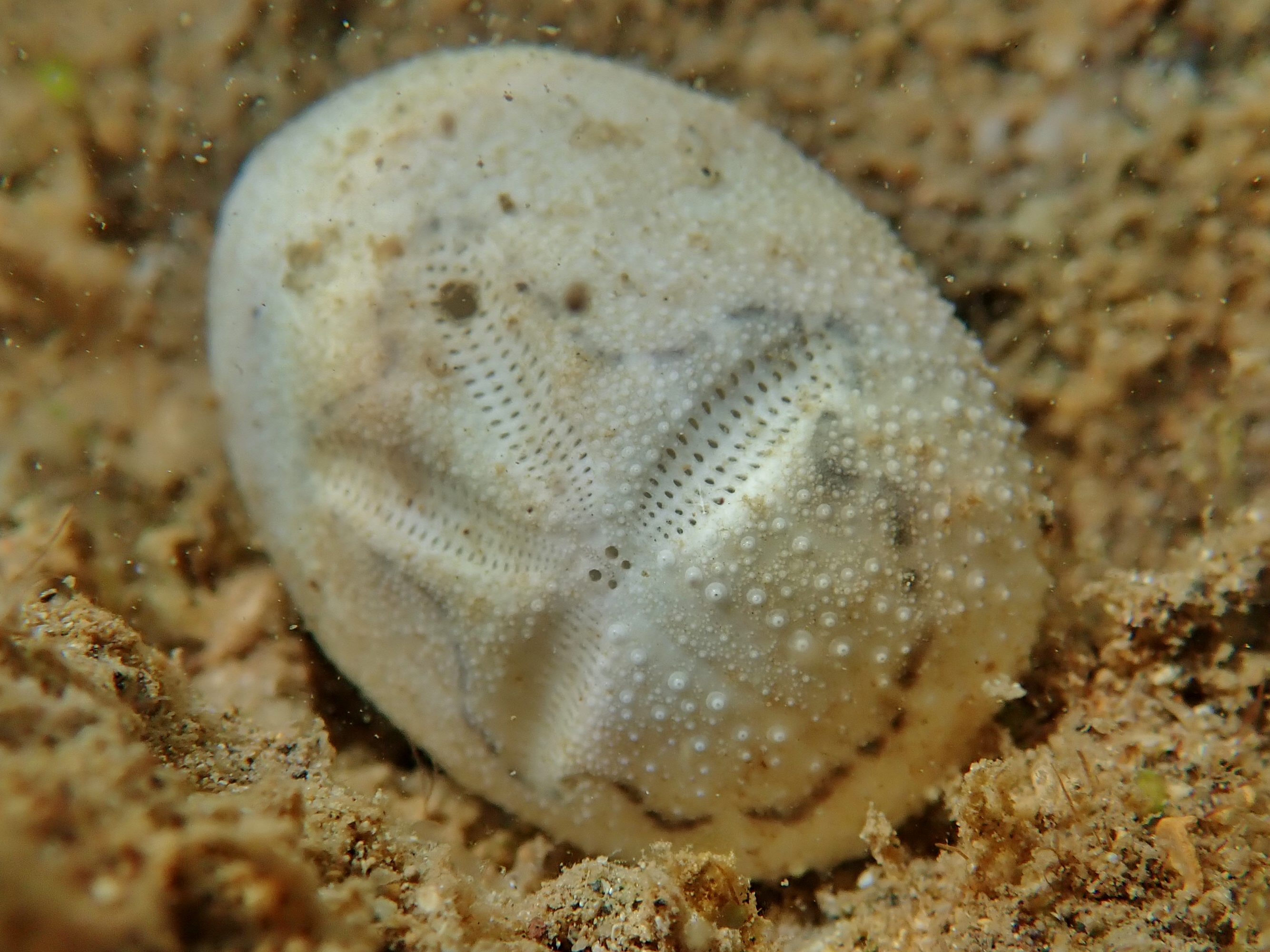 Test mort d'un oursin irrégulier Brissus latecarinatus, montrant le fasciole péripétale en sombre.